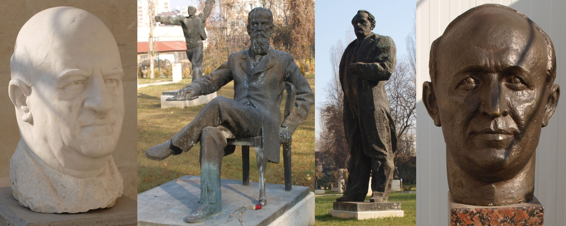 Бюстове на бележити български комунисти в парка на Музея на социалистическото изкуство в София - Васил Коларов, Димитър Благоев, Георги Димитров и Тодор Живков.